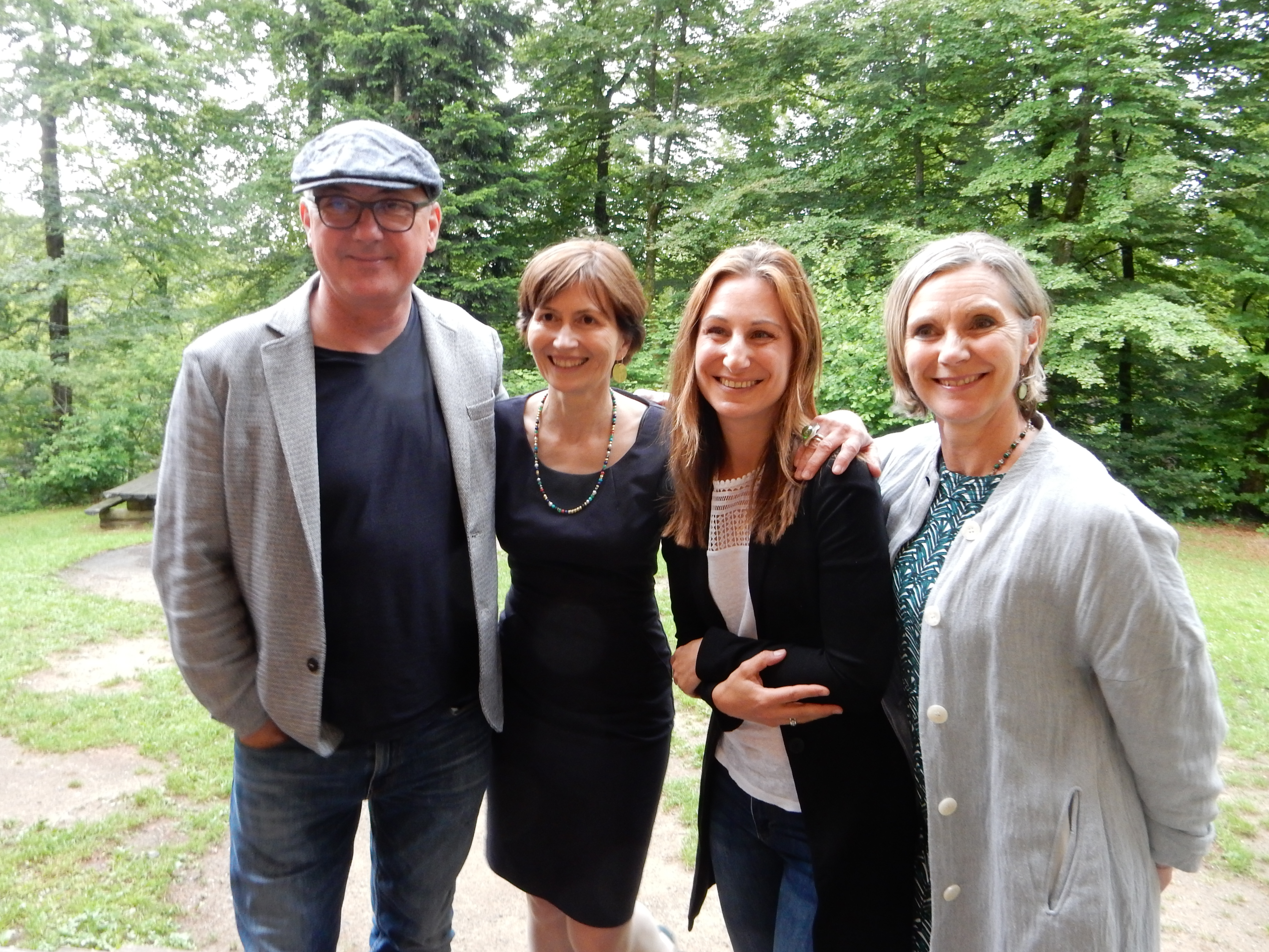 Politikerinnen und Politiker der Schweizer Grünen. Von links nach rechts: Isaac Reber (Regierungsrat Kanton BL) und die drei Nationalrätinnen Regula Rytz (Parteipräsidentin, Kanton BE), Adèle Thorens Goumaz (VD) und Maya Graf (BL)